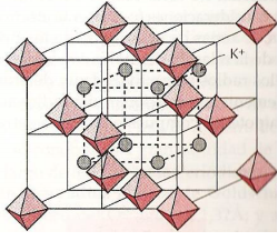 Potasio hexakloroplatinato